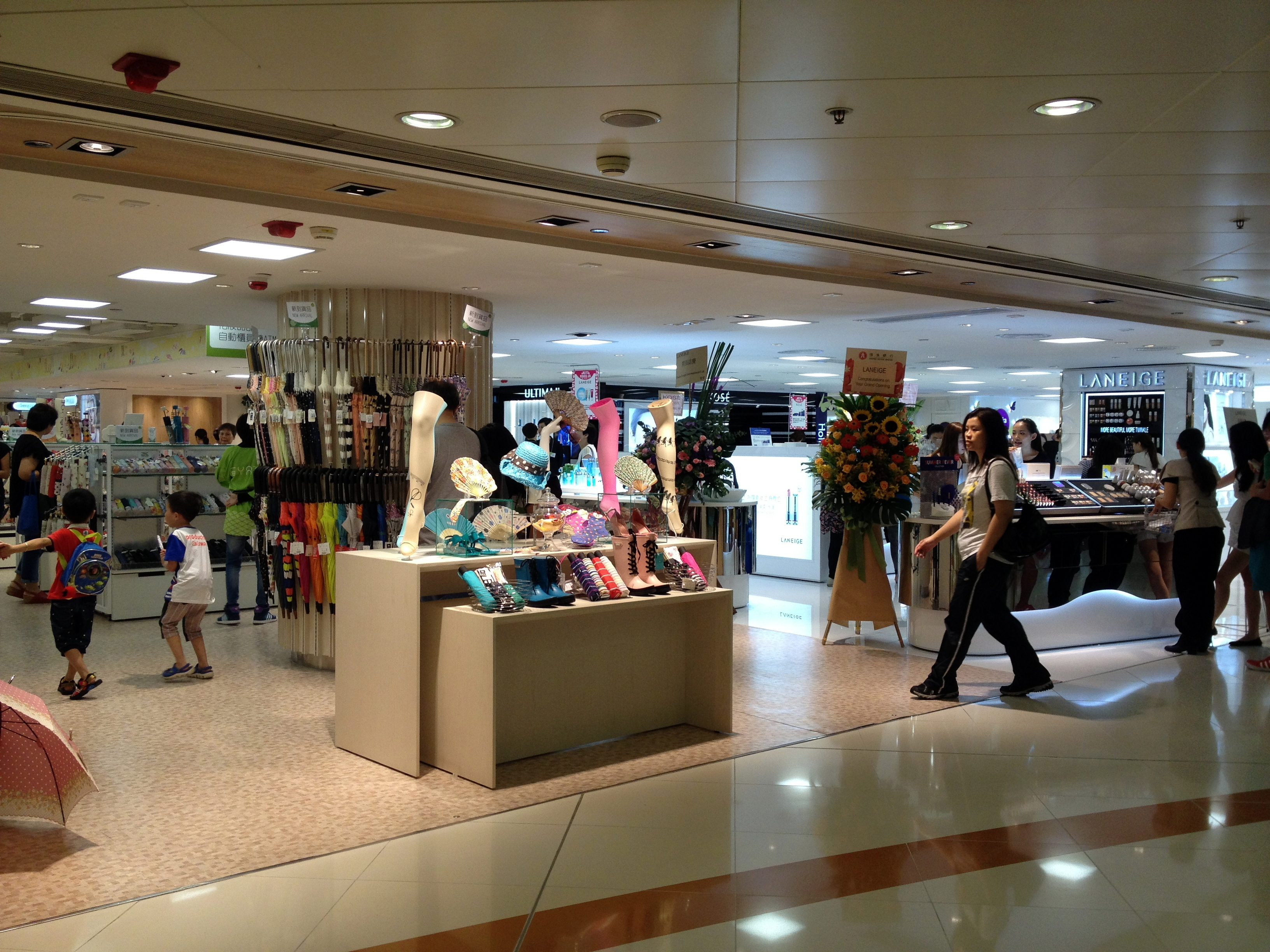 Yata Tsuen Wan Store L2 Entrance